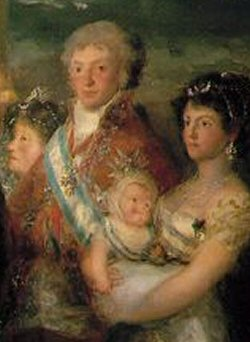 Lodewijk I van Eturië; detail van La familia de Carlos IV door Francisco Goya.